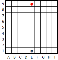 Partida de Quoridor.